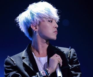 G-Dragon